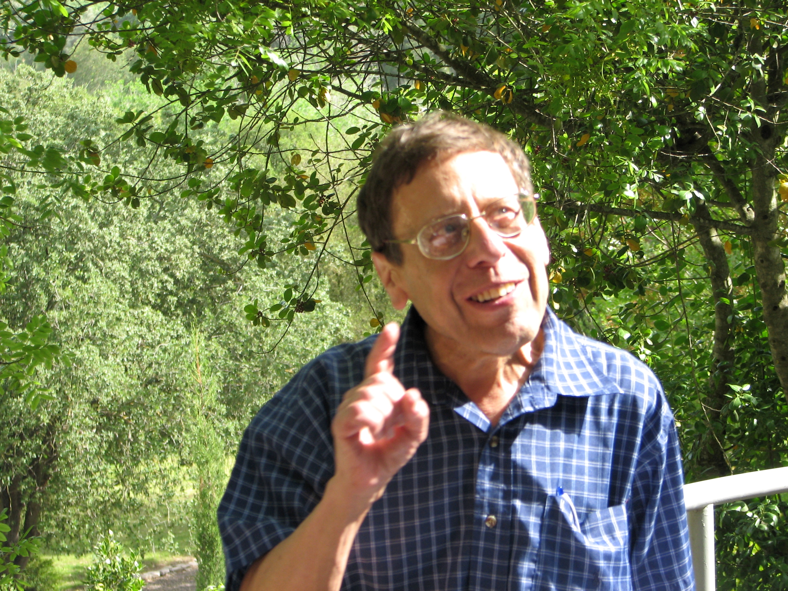 Professor Yeshayahu Gafni, Historian from Israel. Hebrew University of Jerusalem ישעיהו גפני (נולד ב-1944 בניו-יורק) הוא פרופסור בחוג להיסטוריה של עם ישראל באוניברסיטה העברית. צולם בסיור של האוניברסיטה העברית בבית שערים, במסגרת קורס. מסביר לסטודנטים